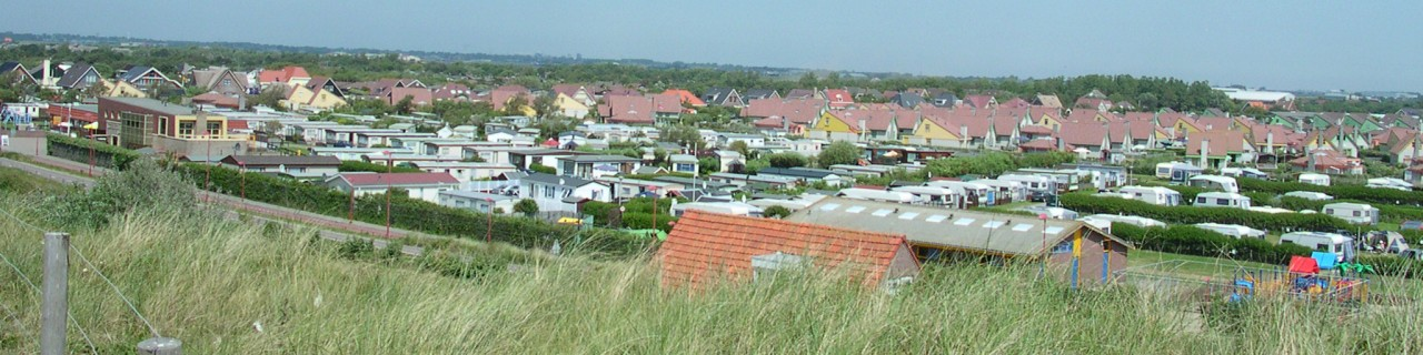 Badplaats Julianadorp aan Zee. Beach resort Julianadorp aan Zee.